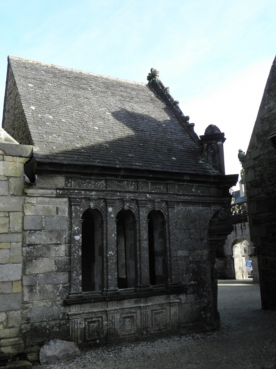 Façade occidentale de l'ossuaire d'attache de l'église Saint-Salomon de La Martyre (29).